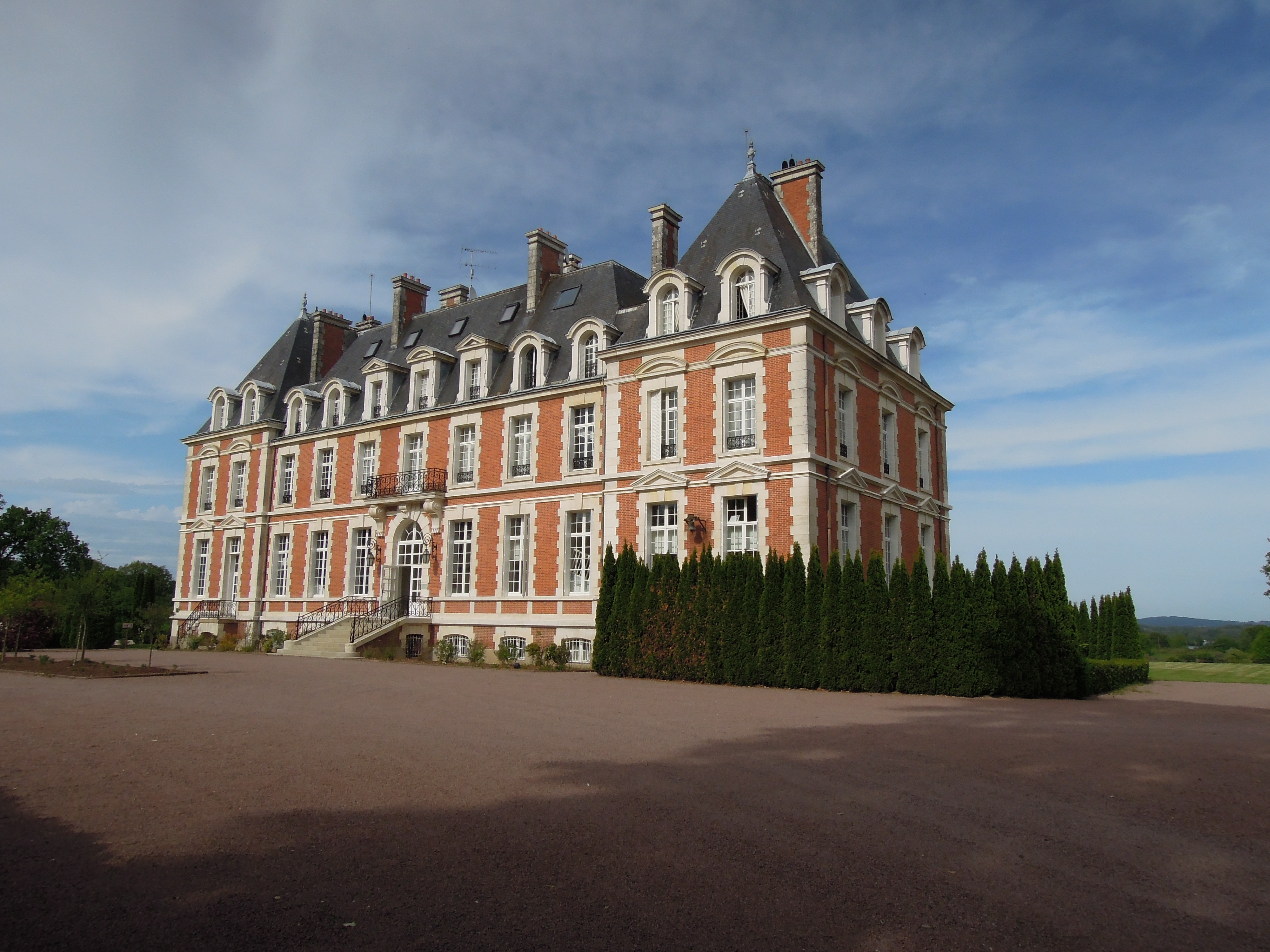 Château de la Cazine à Noth (Creuse).